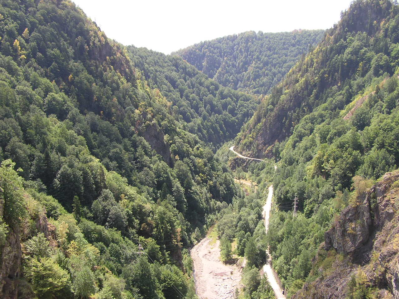 Ansicht auf das alte Flussbett des Argeş, von der Talsperre Vidraru, Rumänien.